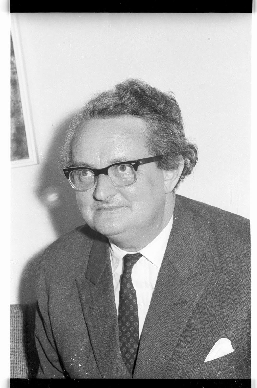 bei der Erstaufführung seiner Oper Dantons Tod im Stadttheater.